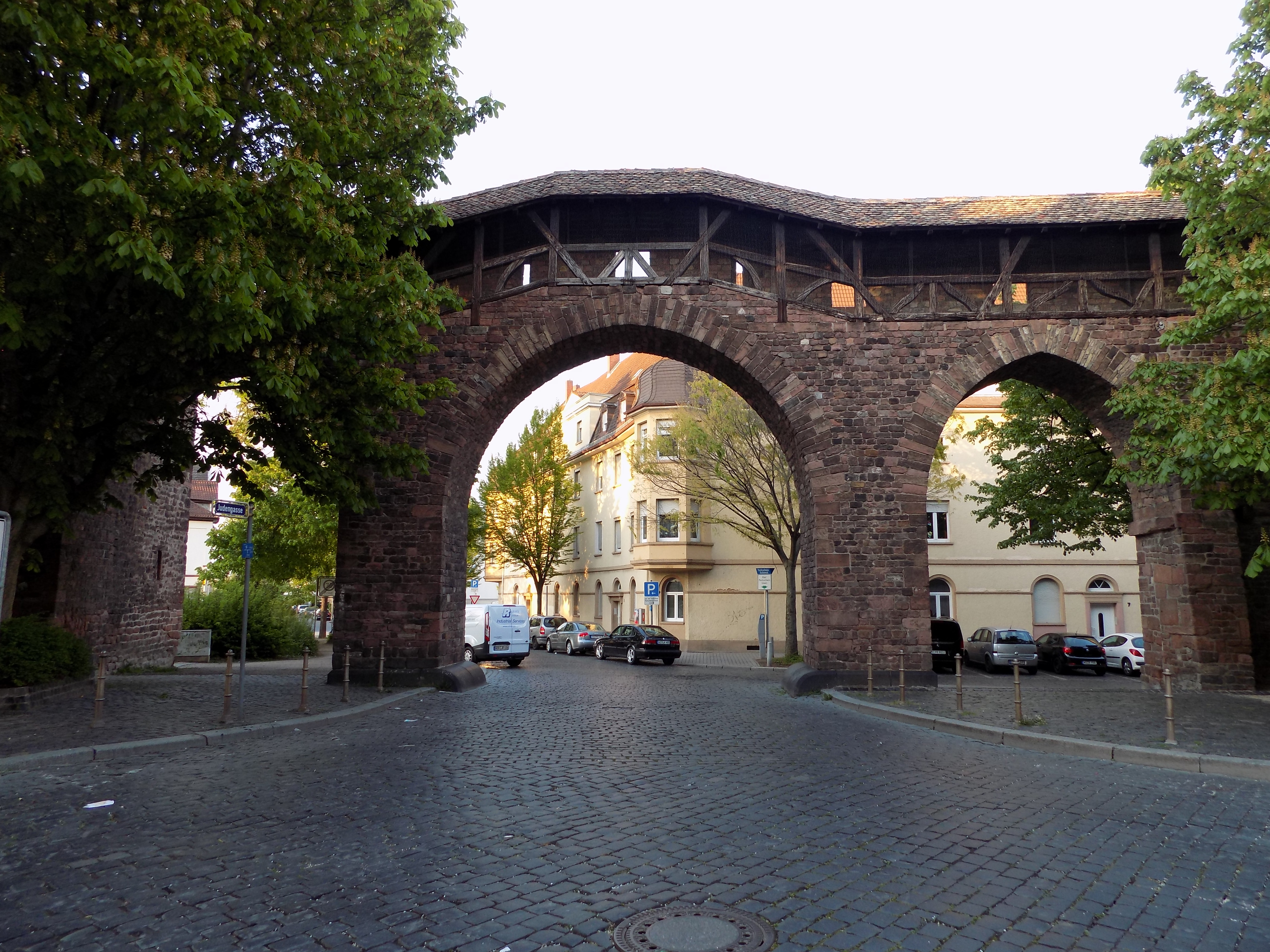 Raschitor Worms